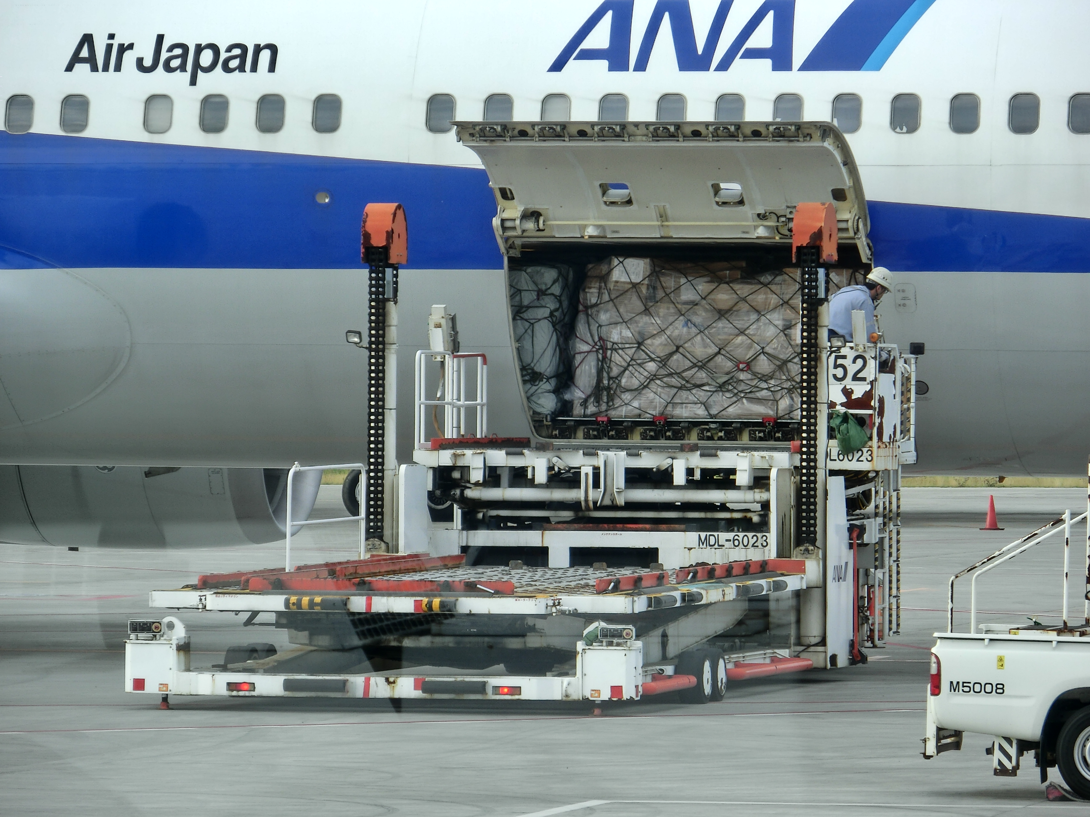 旅客機の貨物コンテナの搭載作業。成田空港にて：2013年7月